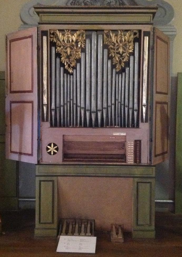 L'organo Agati (1826) del Museo nazionale della scienza e della tecnologia Leonardo da Vinci a Milano